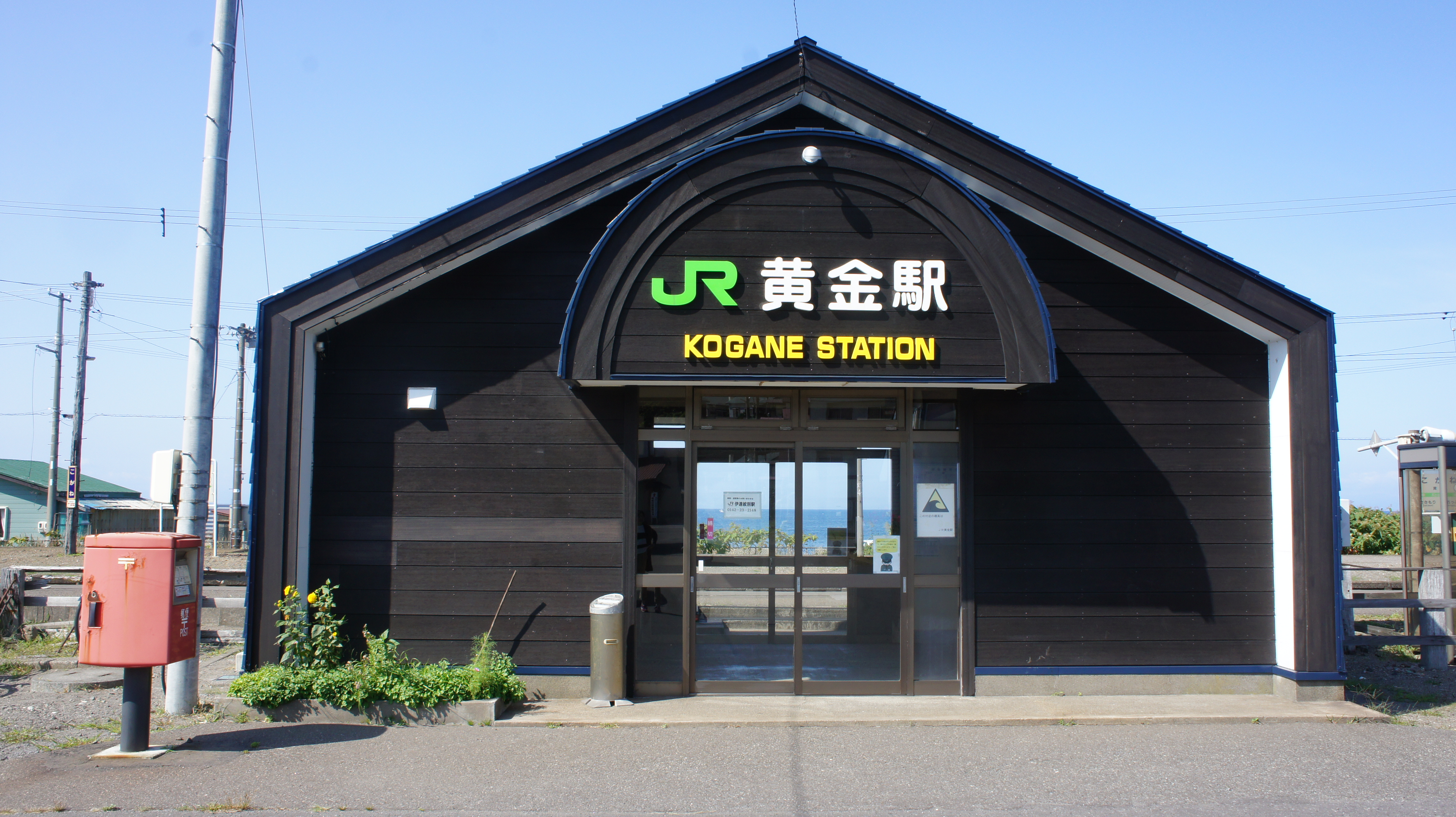 JR室蘭本線・黄金駅の駅舎